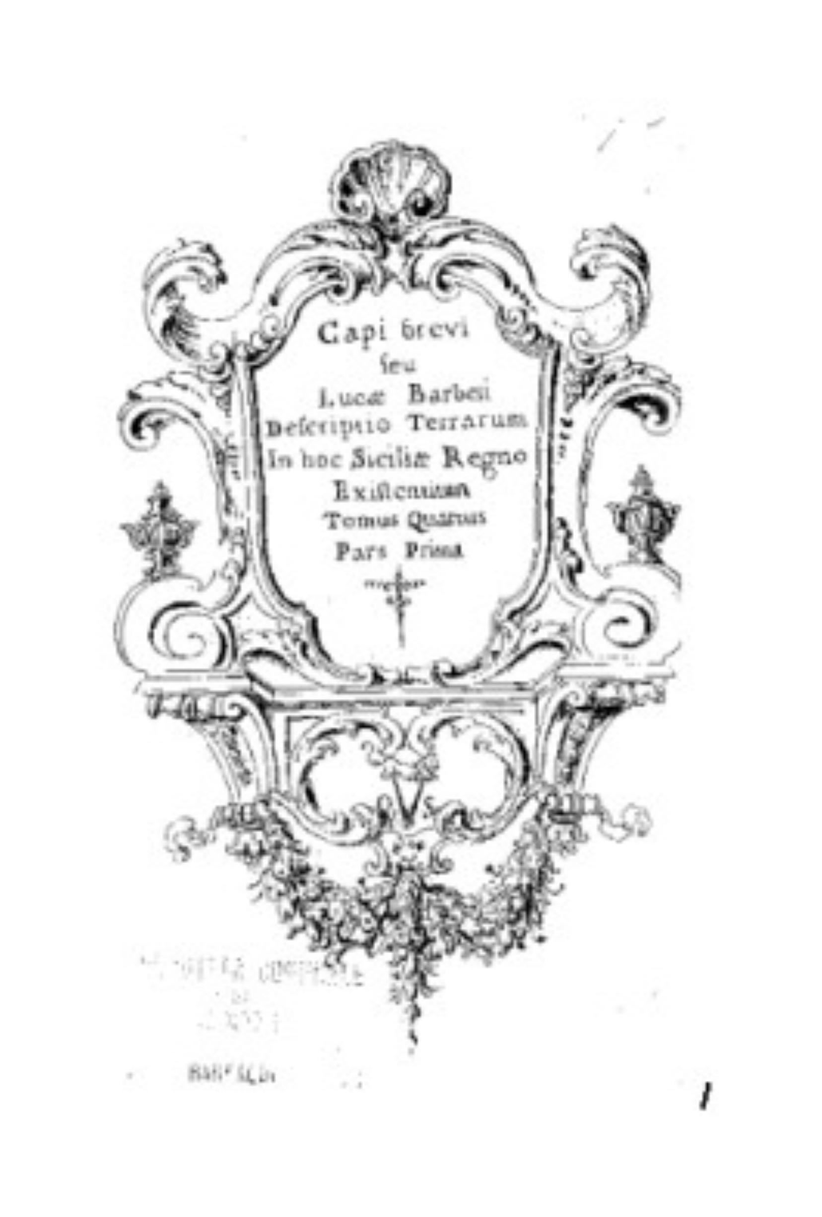 Aidone EN_Sicilia: Frontespizio di uno dei sei tomi manoscritti dei Capibrevi di Giovanni Luca Barberi, conservati nella Biblioteca Comunale "Gaetano Scovazzo".